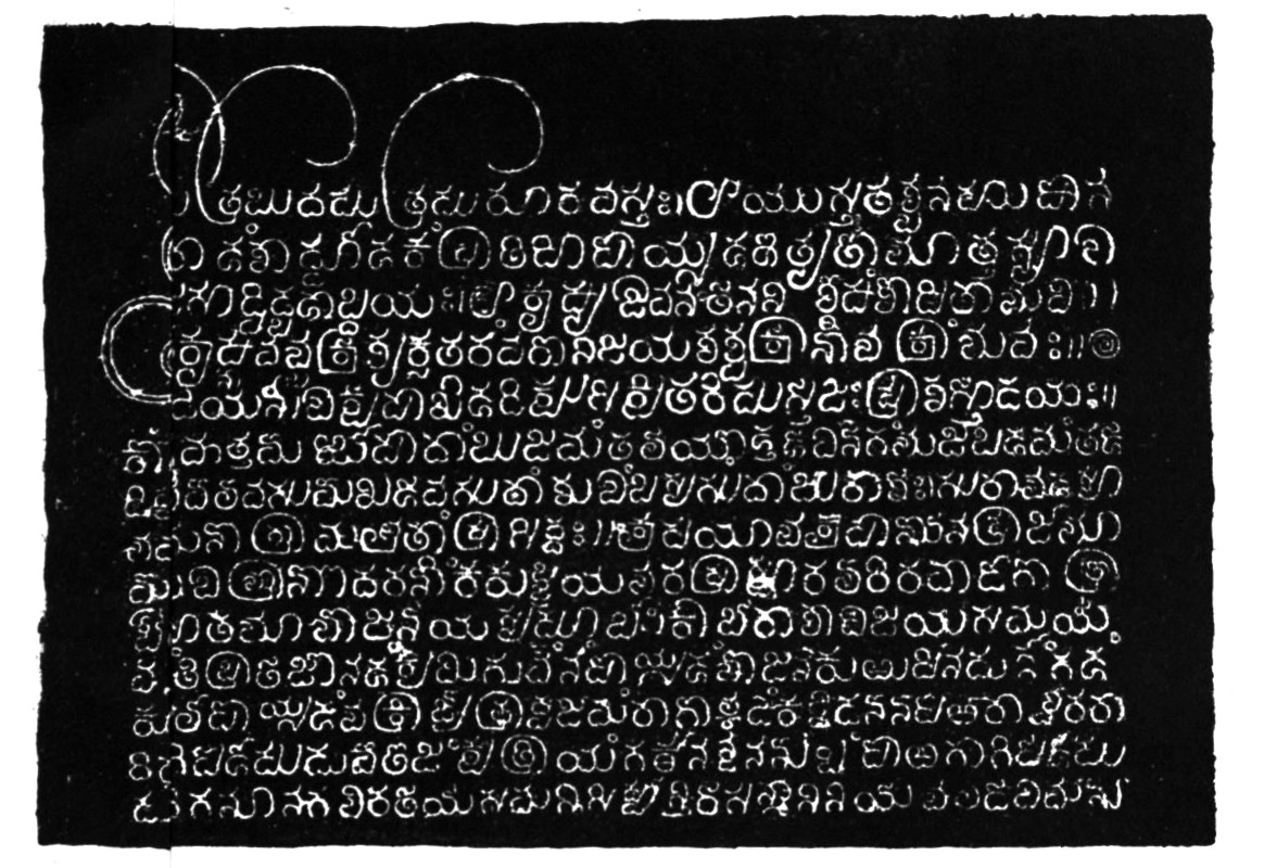 Inscription at Belur temple